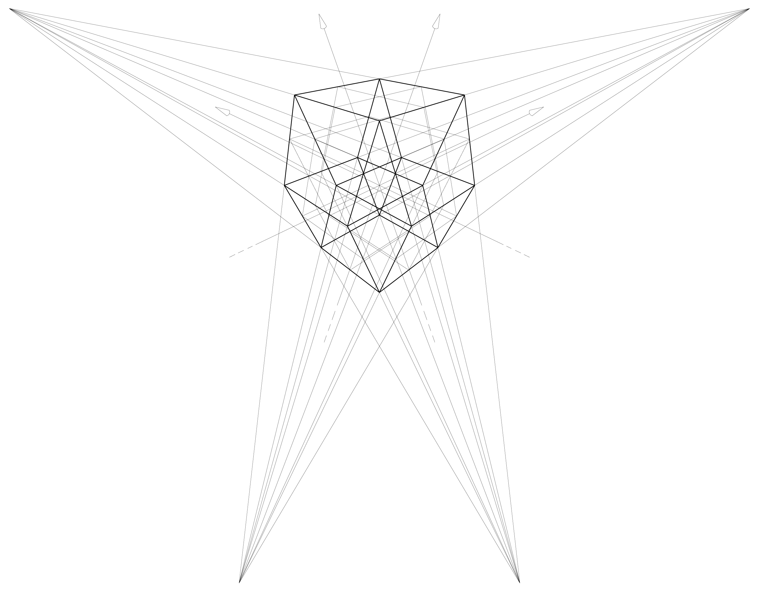 Descrizione del contenuto: Studio di un Ipercubo di 4° livello costruito in una prospettiva a 4 fuochi; Fonte del file: Opera personale (Federico Ciccarese); Data della creazione o della pubblicazione: 05-06-2008, 09-06-2008; Autore del file: Opera personale (Federico Ciccarese); Licenza